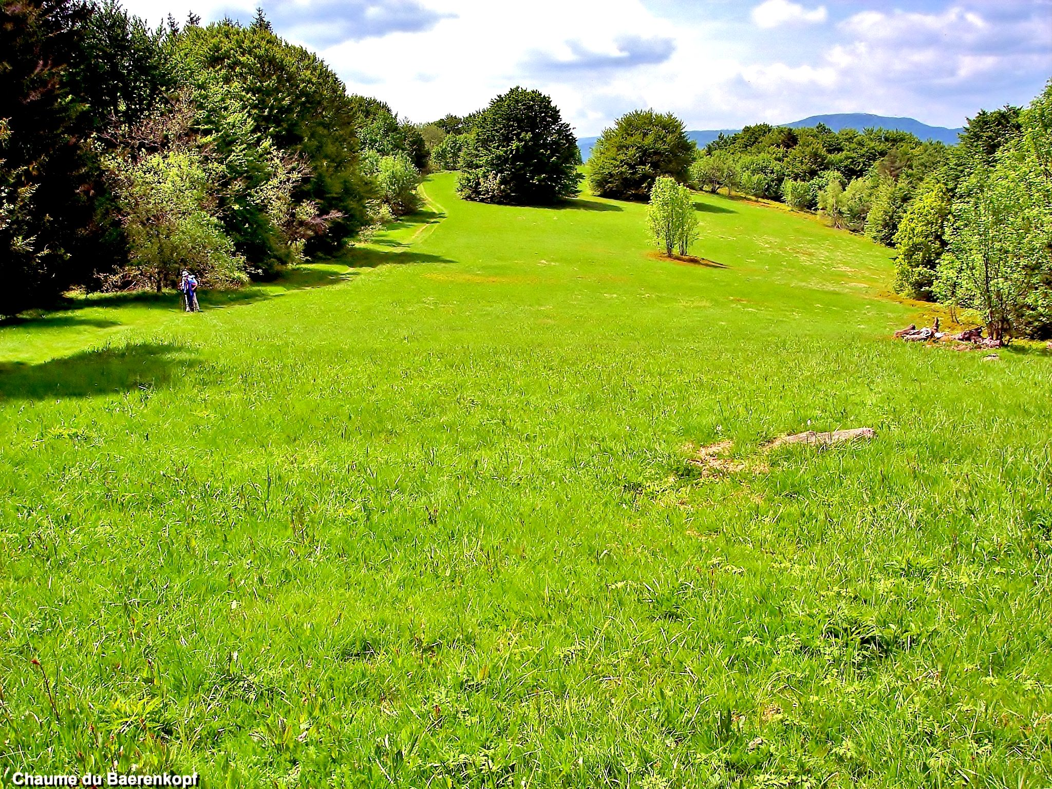 Chaume du Baerenkopf. Kirchberg. Haut-Rhin